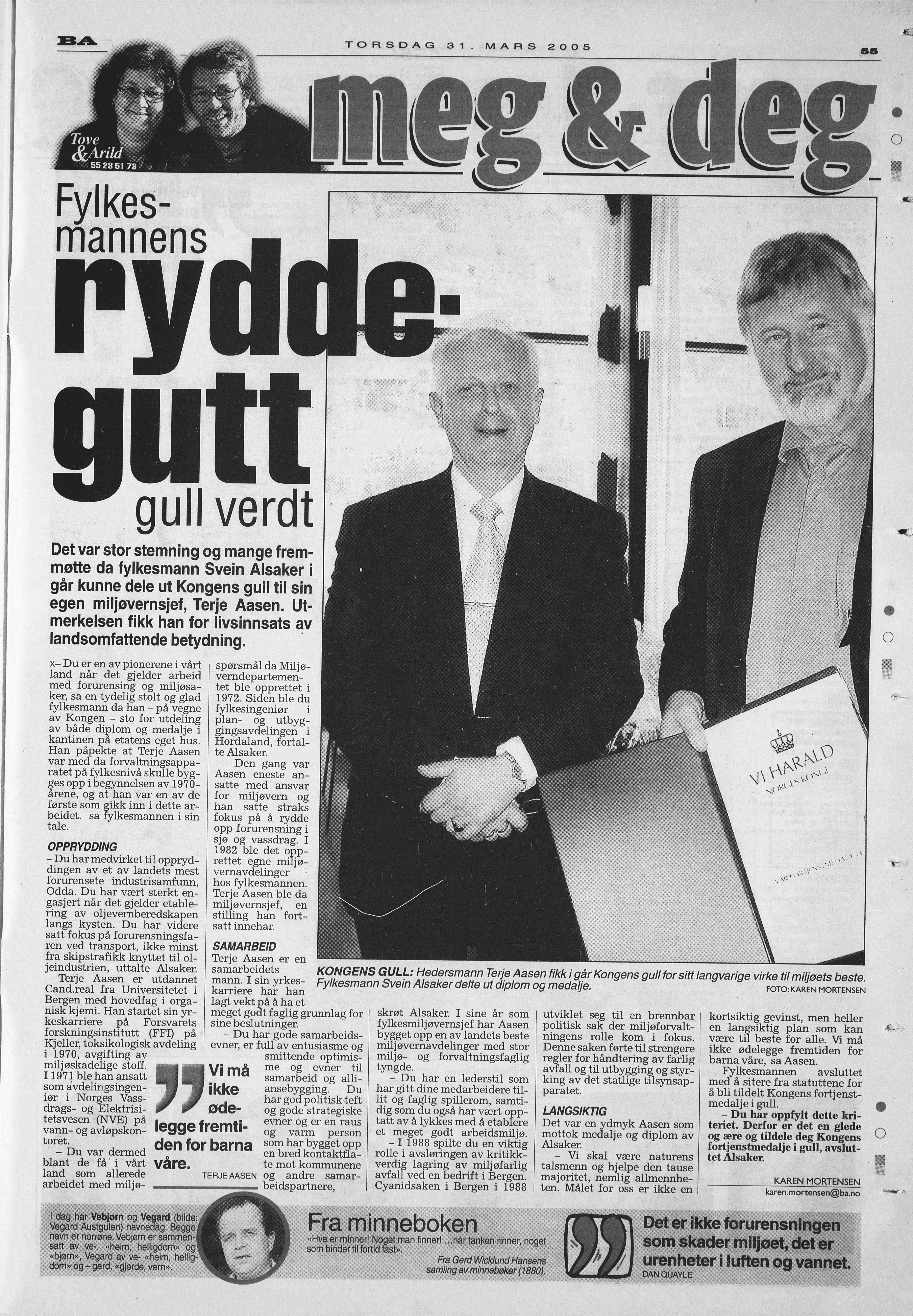 Side 55 i Bergensavisen Fylkesmann Svein Alsaker Miljøvernleder Terje Aasen